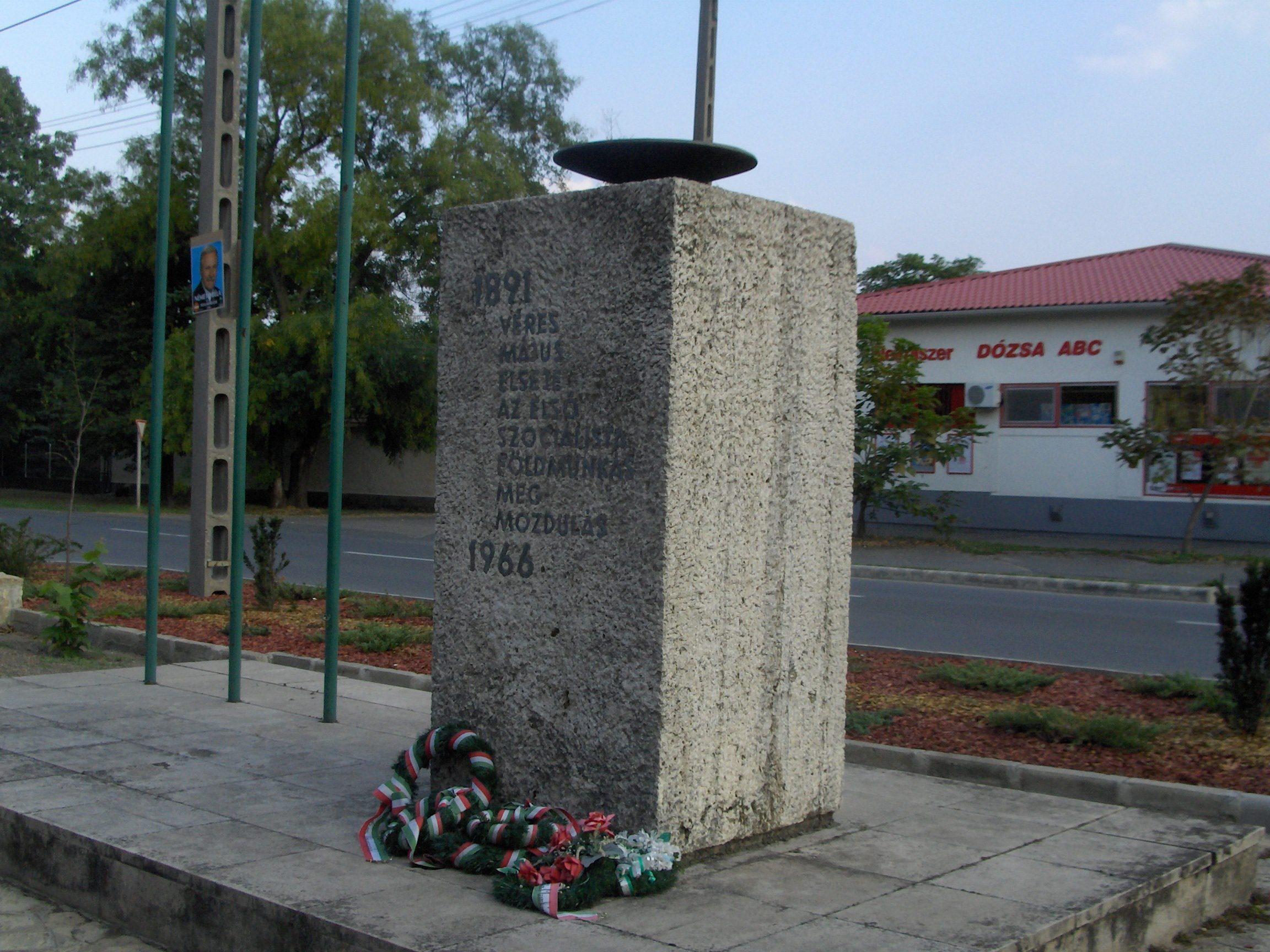 "Véres május elseje" az első orosházi agrárszocialista földmunkás megmozdulás emlékére (Rajki László, 1966) - Orosháza, Dózsa György utca